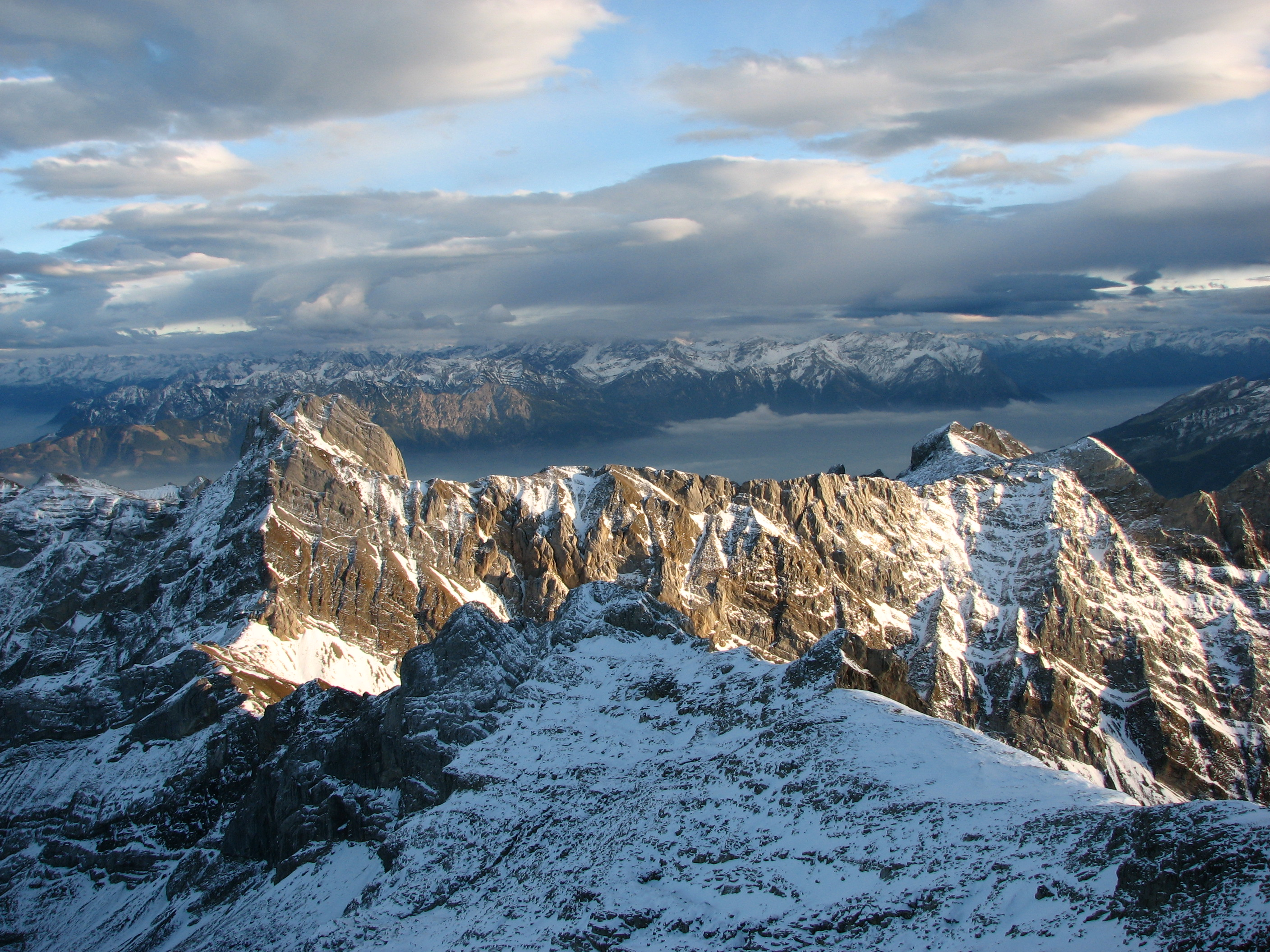 Altmann, Schweiz. Fotografiert vom Säntis